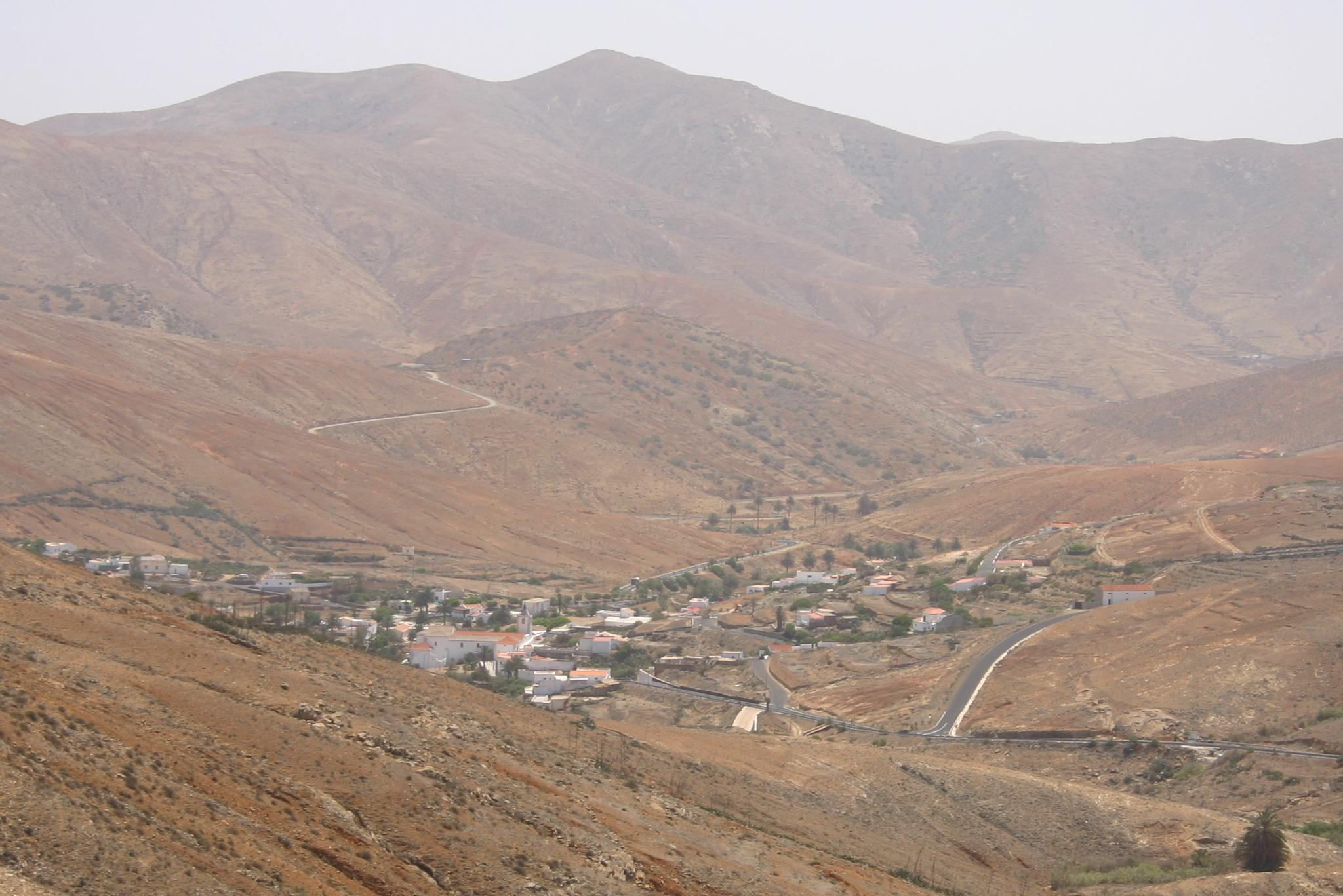 Betancuria von Norden gesehen Betancuria bei Anfahrt von Norden